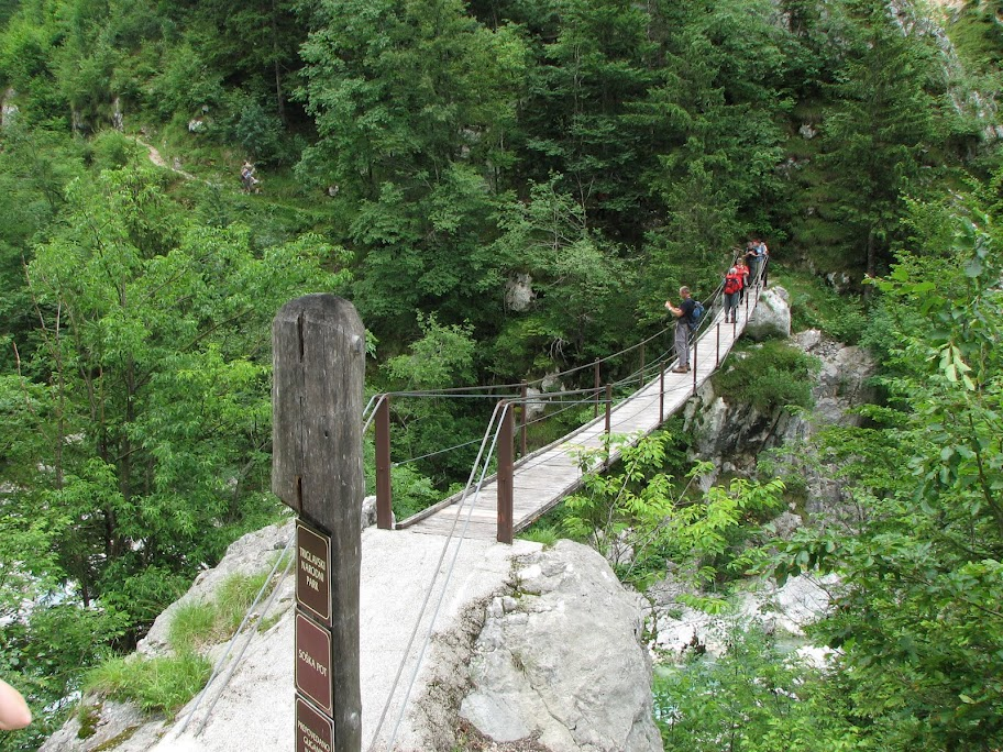 Viseča brv preko Soče na Soški poti